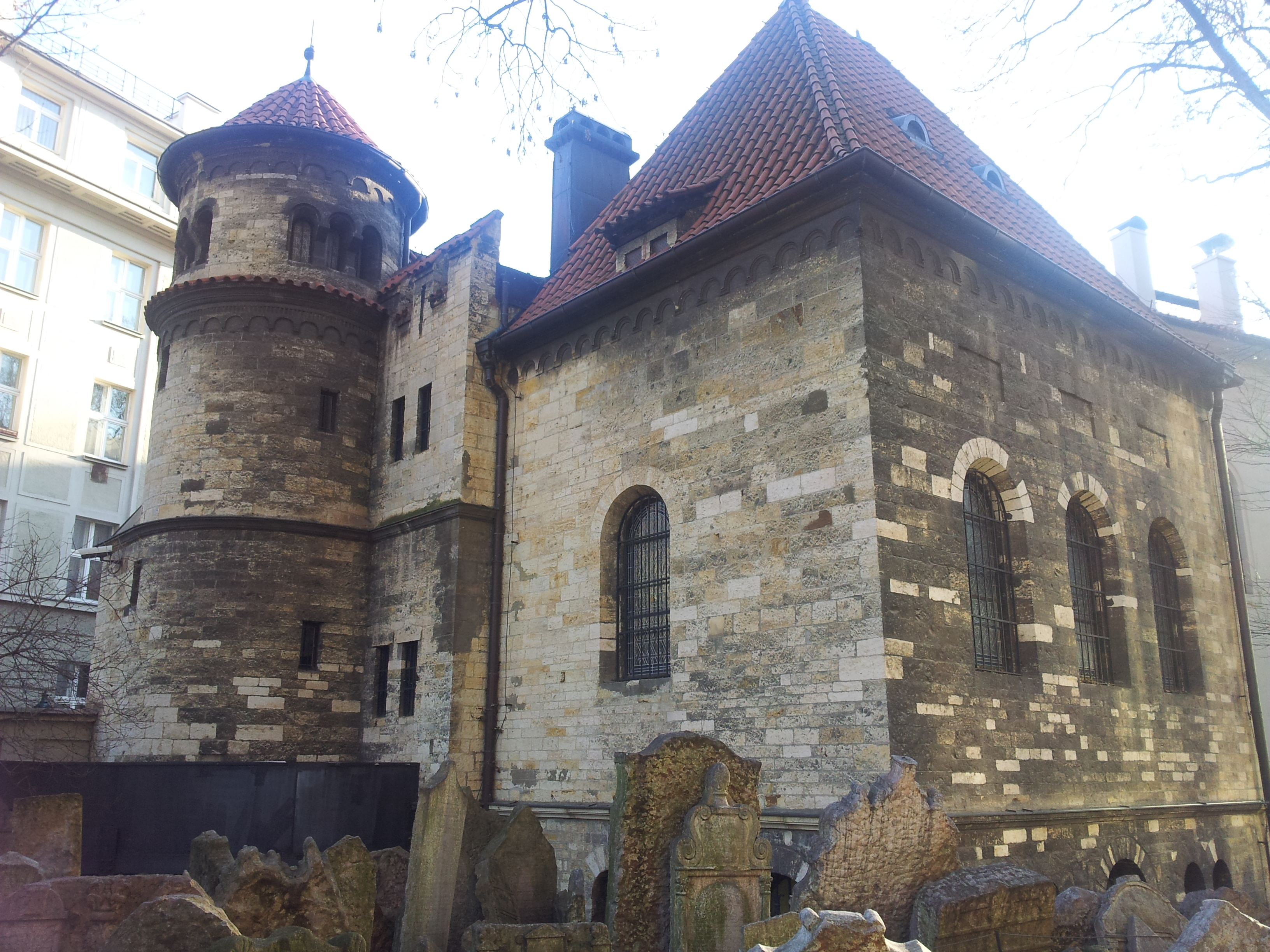 Salle de cérémonie à Prague dans le quartier de Josefov, vue depuis l'ancien cimetière juif.